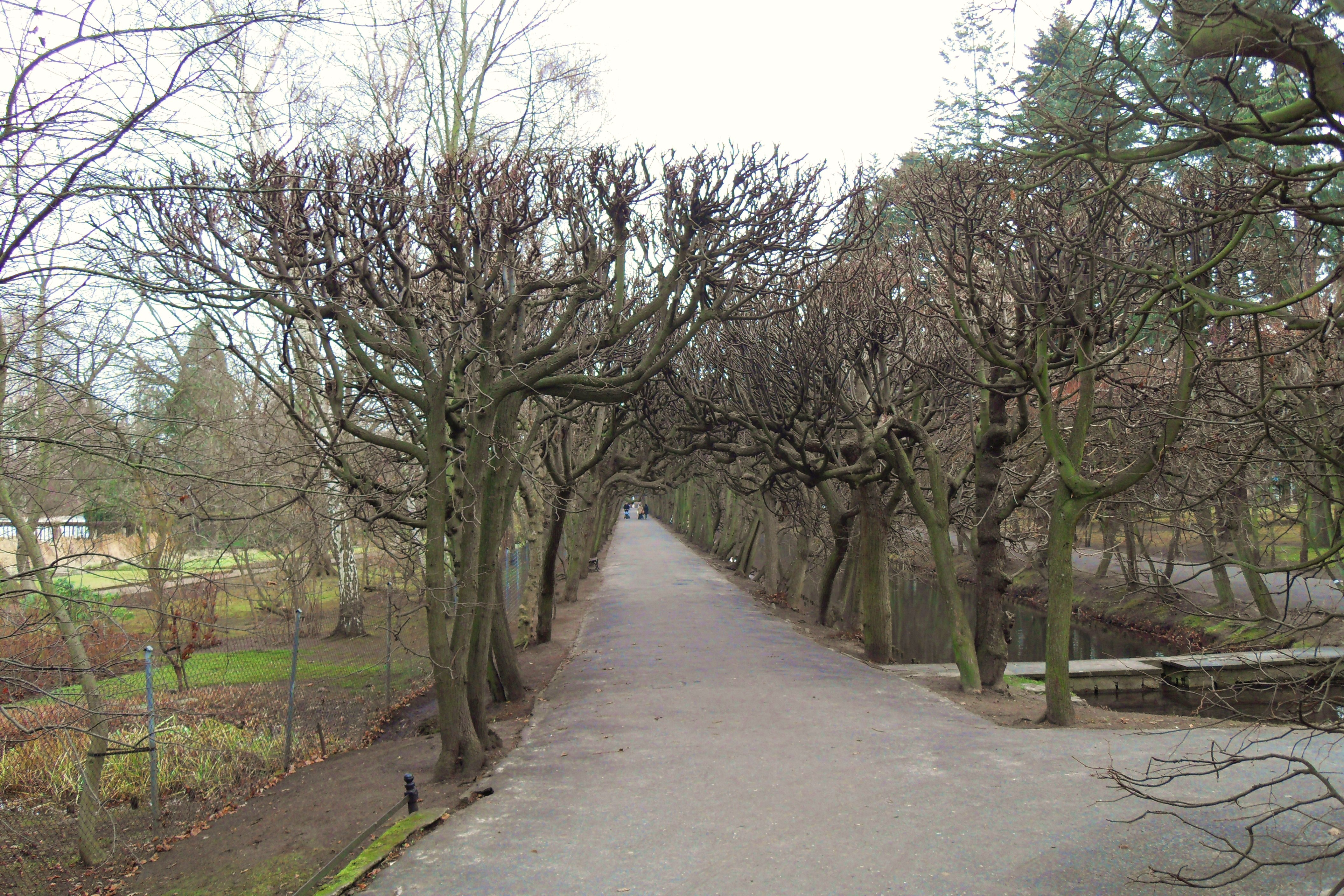 Gdańsk Oliwa, Park Oliwski jesienią.